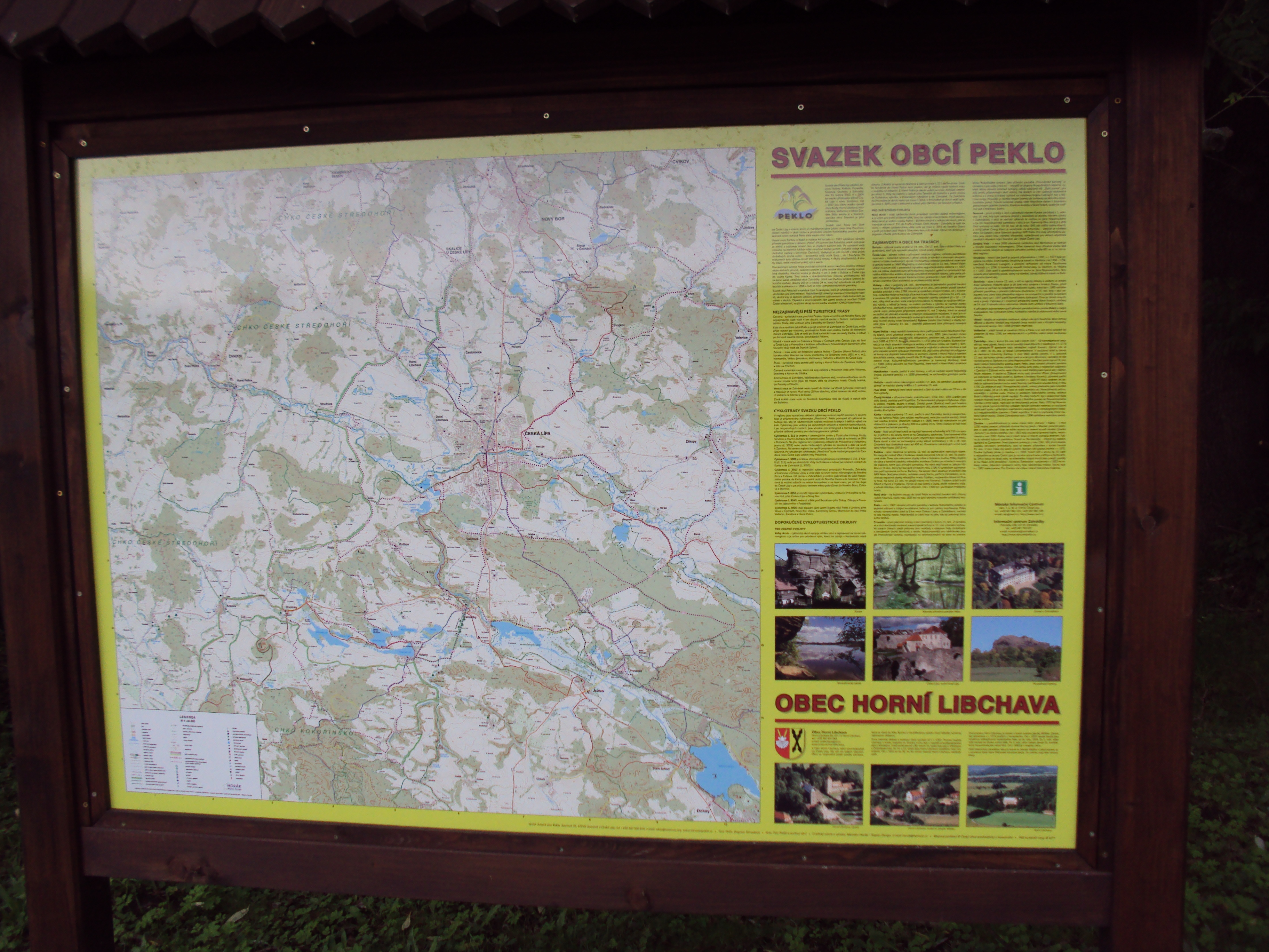 Tabule o Svazku obcí Peklo a o vsi Horní Libchava je poblíž kostela